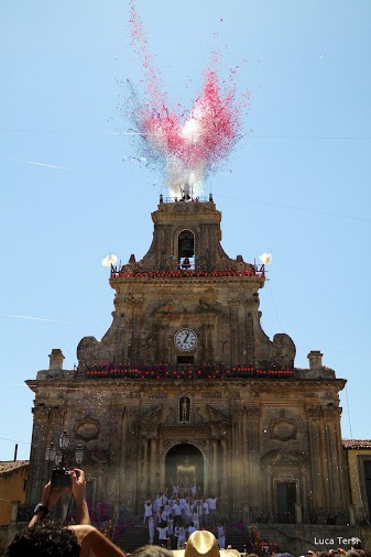 Festa Palazzolo Acreide (Sicilia)